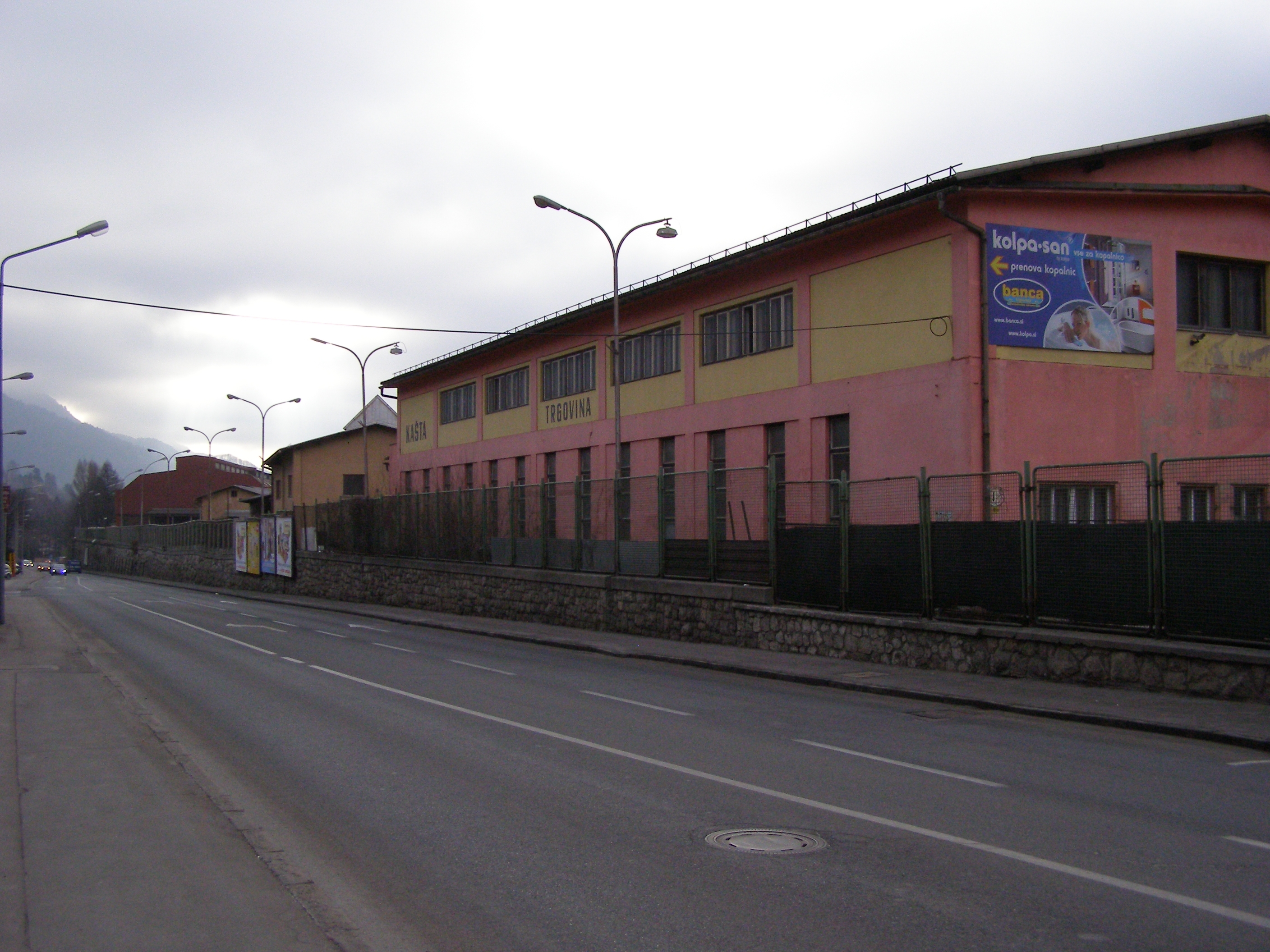 Jesenice - Cesta Železarjev